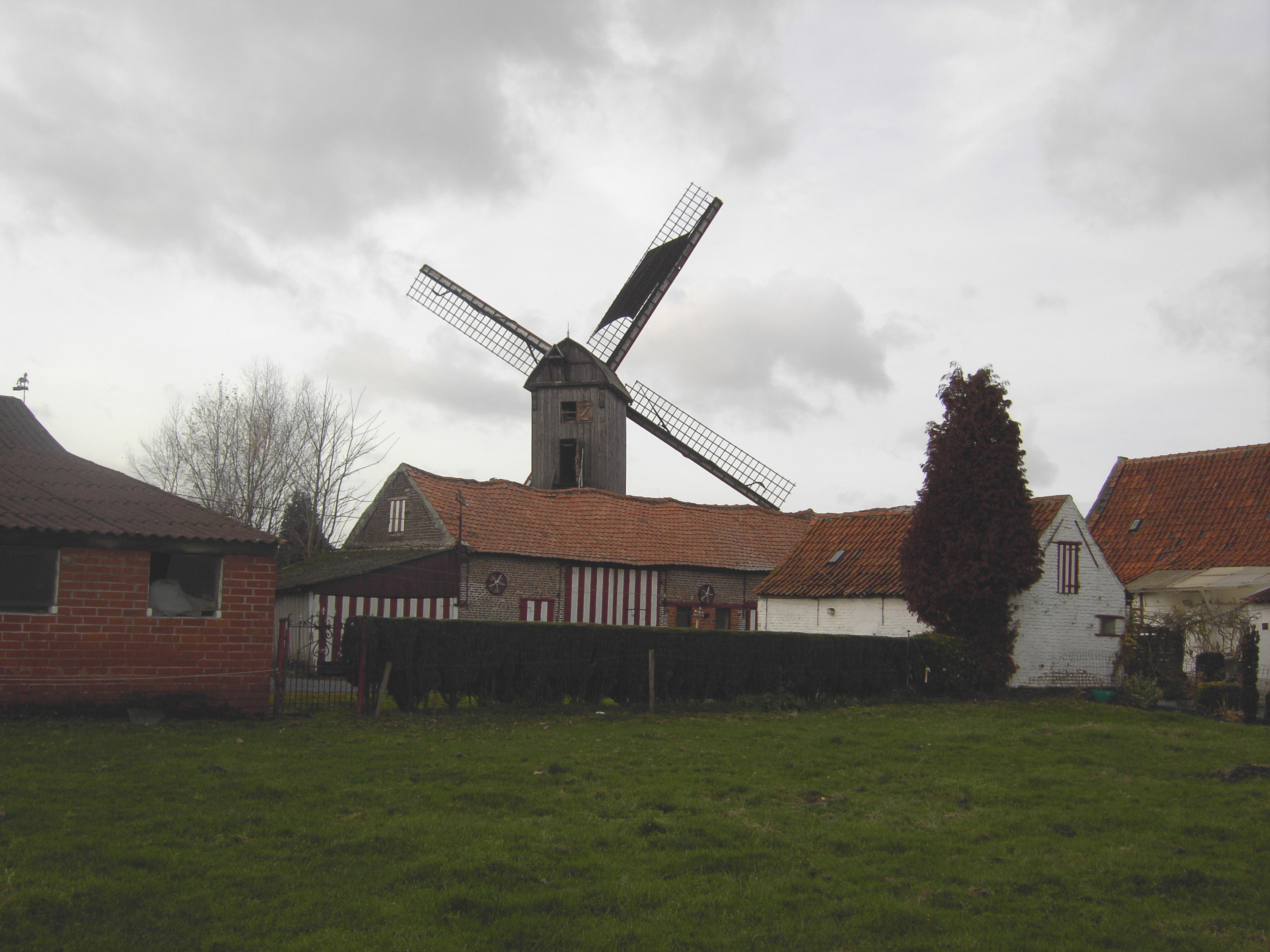 Ursel (Knesselare) - Pietendriesmolen